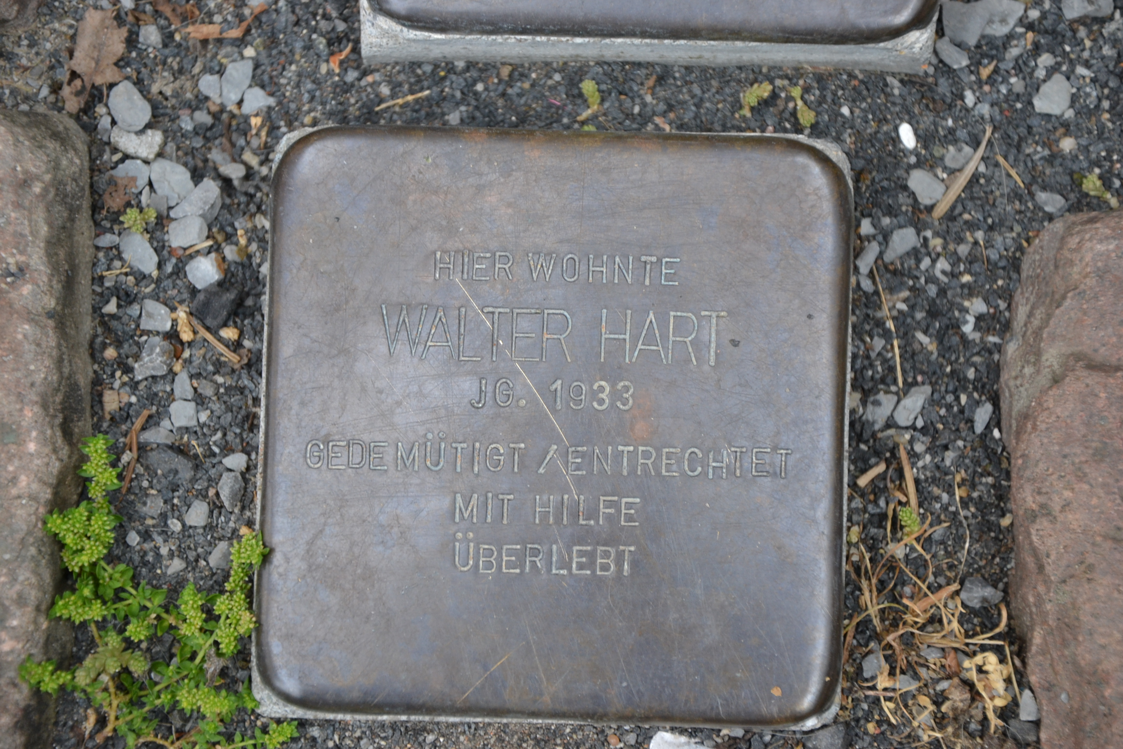 stolperstein